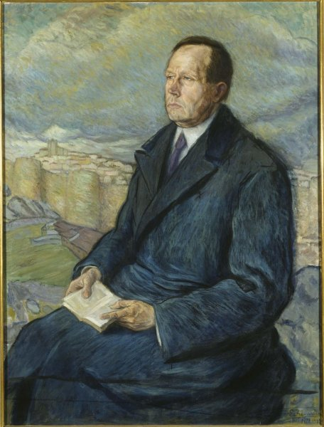 Azorín.